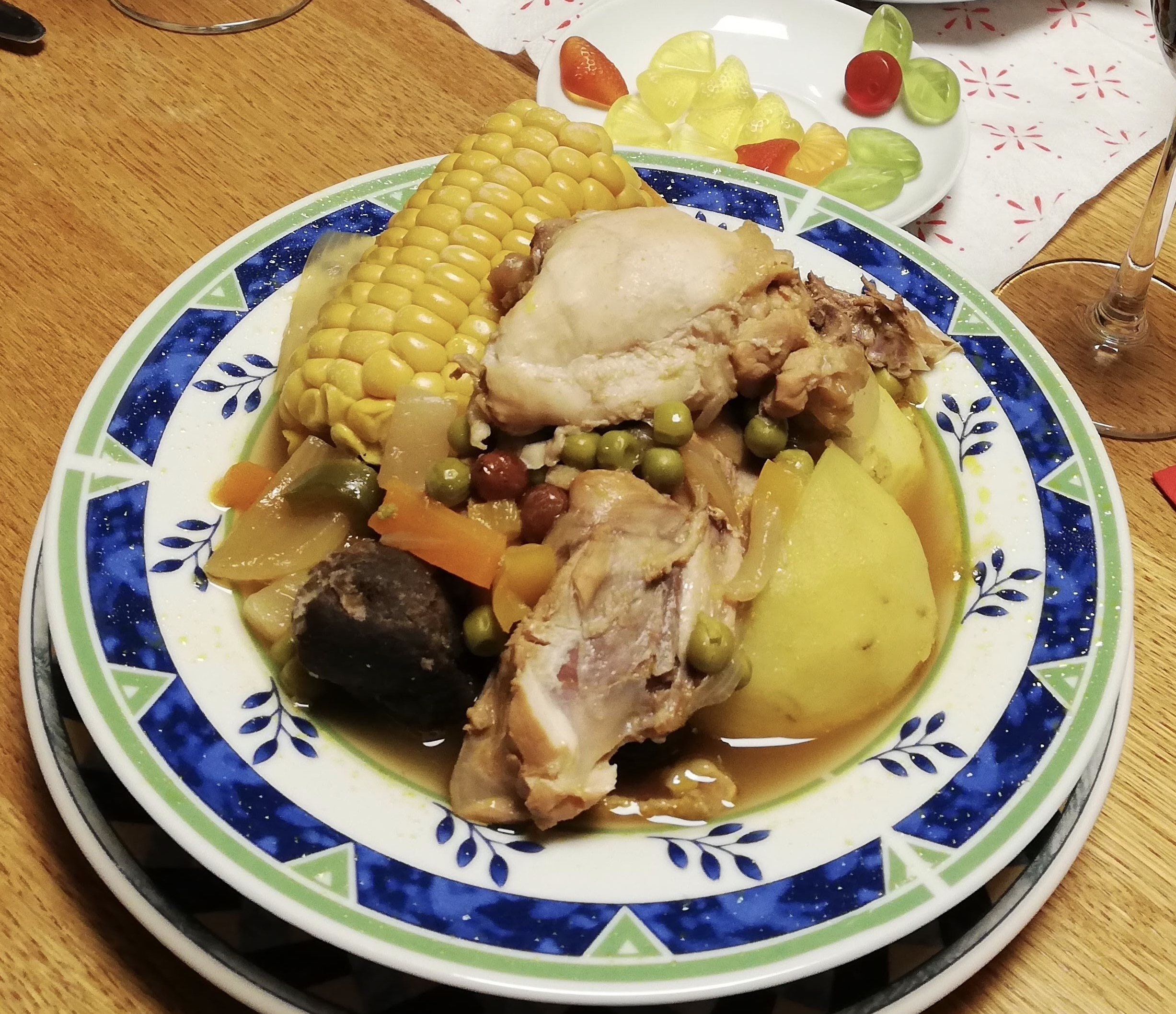 Plato especial para navidad en algunas regiones del occidente boliviano